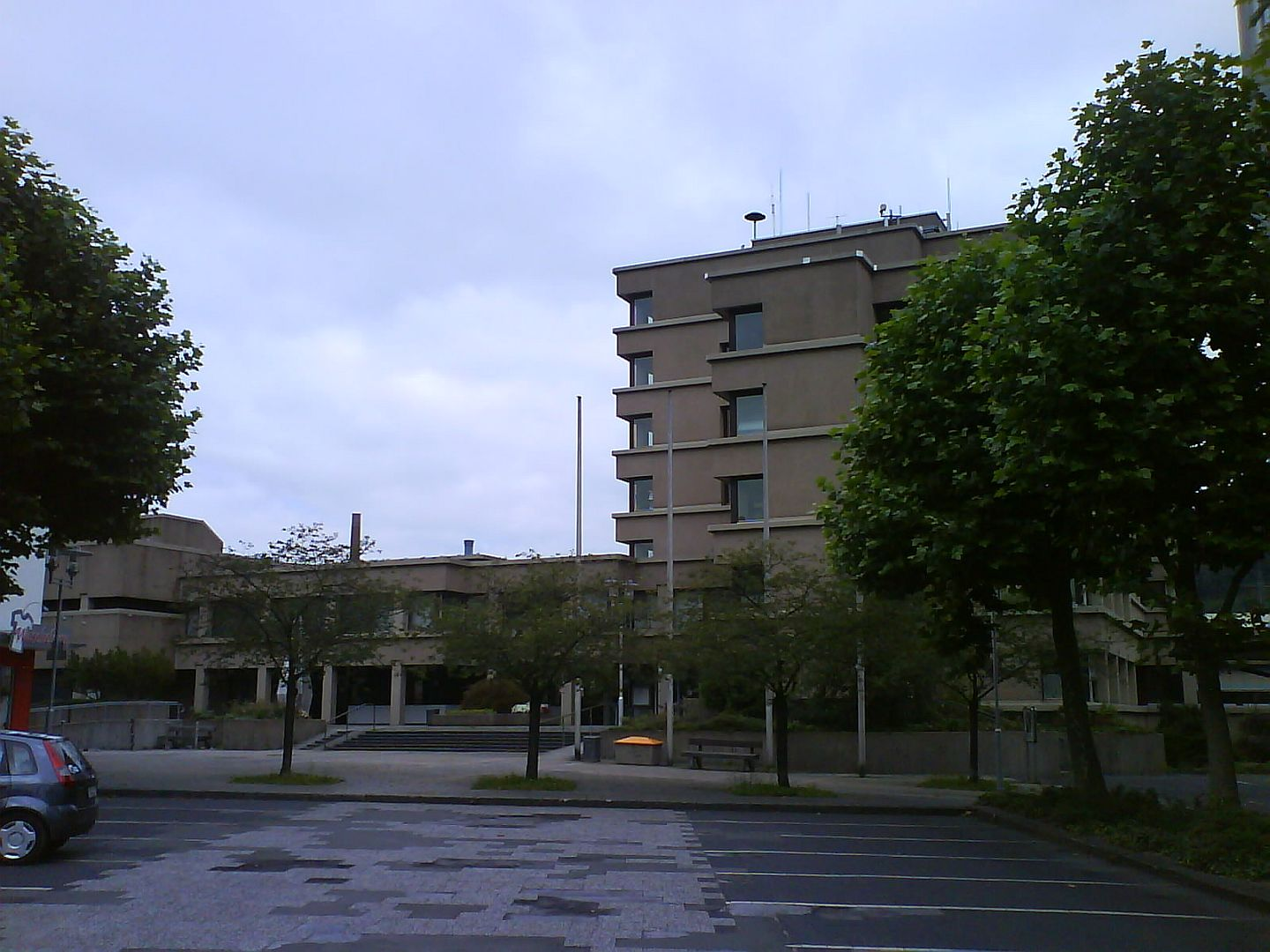 Rathaus im Siegener Stadtteil Geisweid